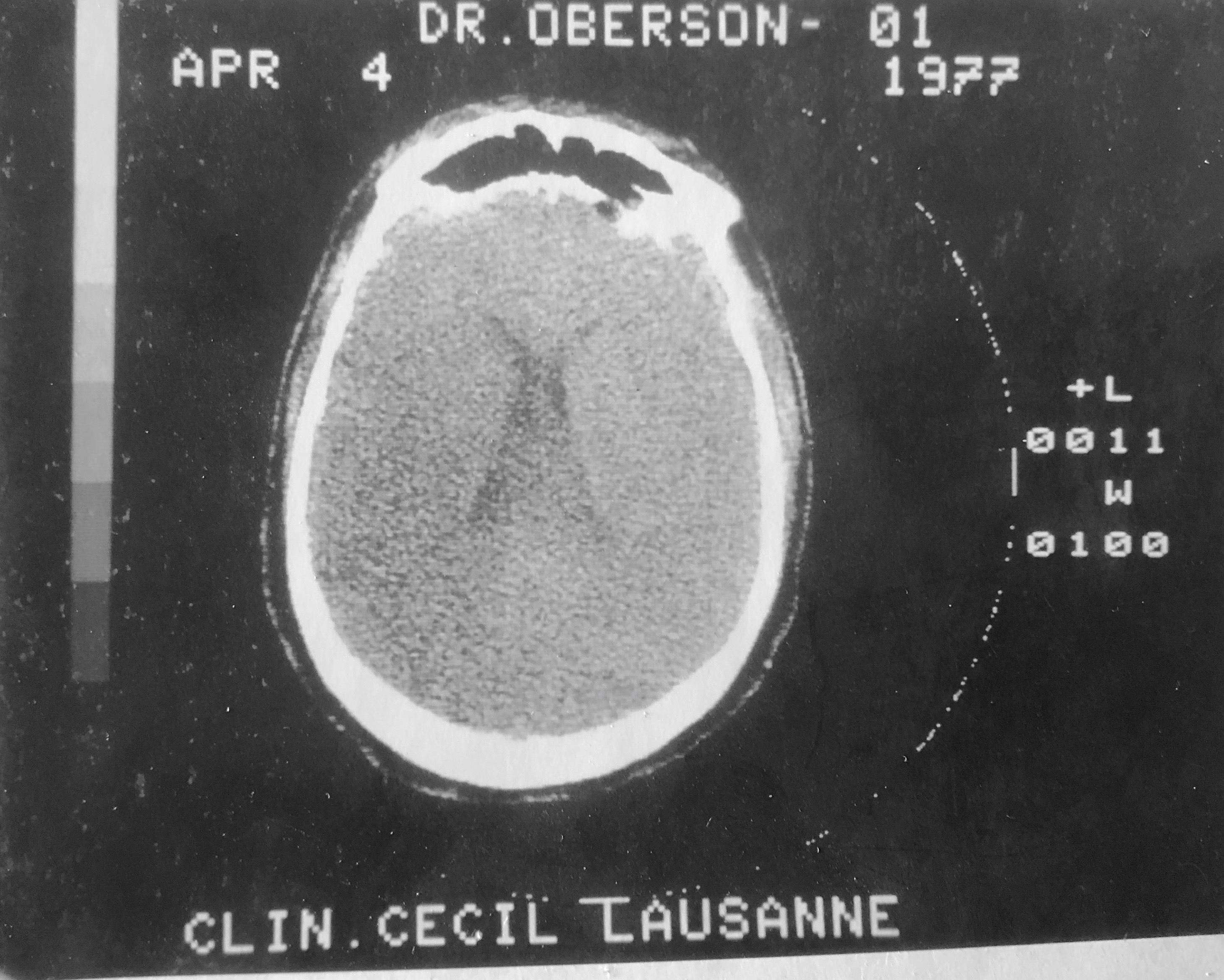 IMAGE réalisée avec EMI-bodyscanner 1977 Clinique Cecil Lausane